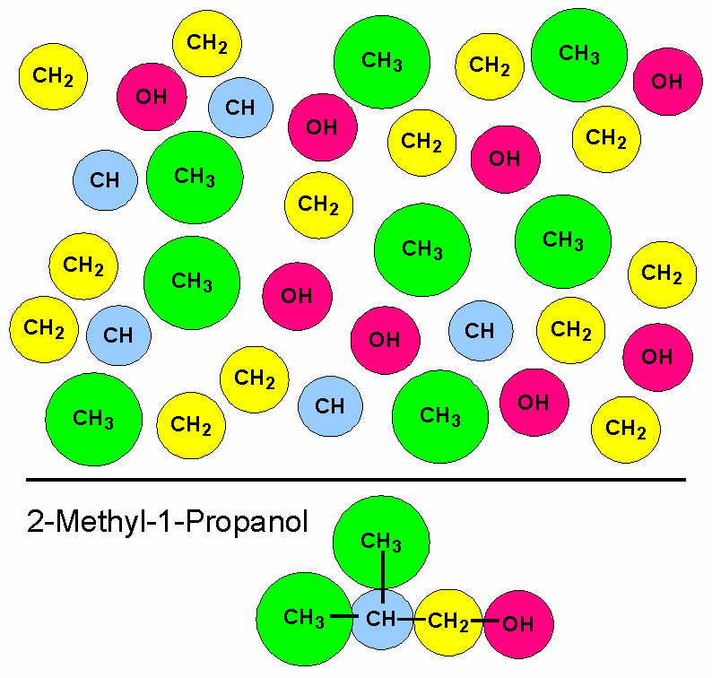 Prinzip einer Gruppenbeitragsmethode